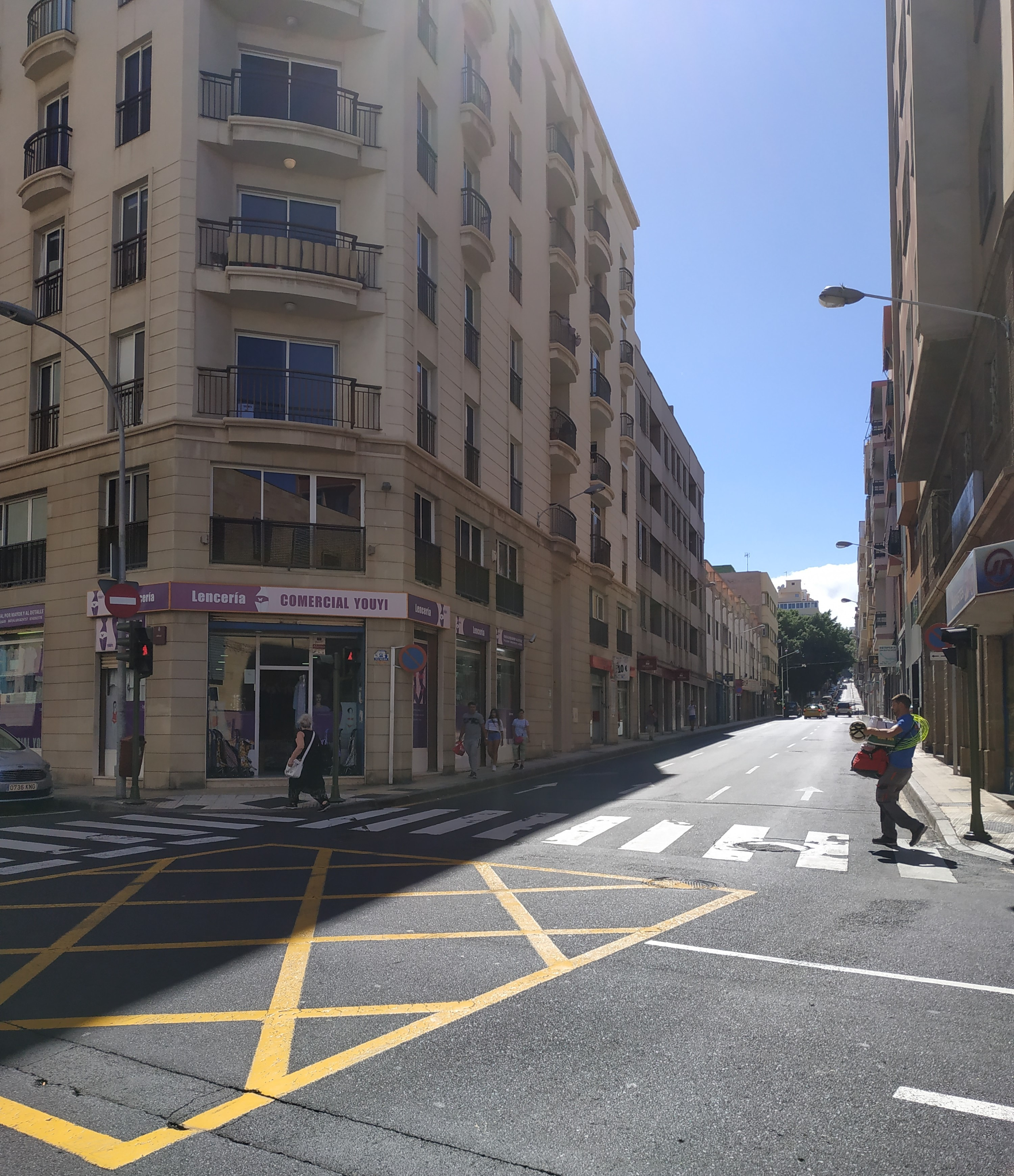 Cruce de las calles Alfaro y Miraflores en Santa Cruz de Tenerife en 2019